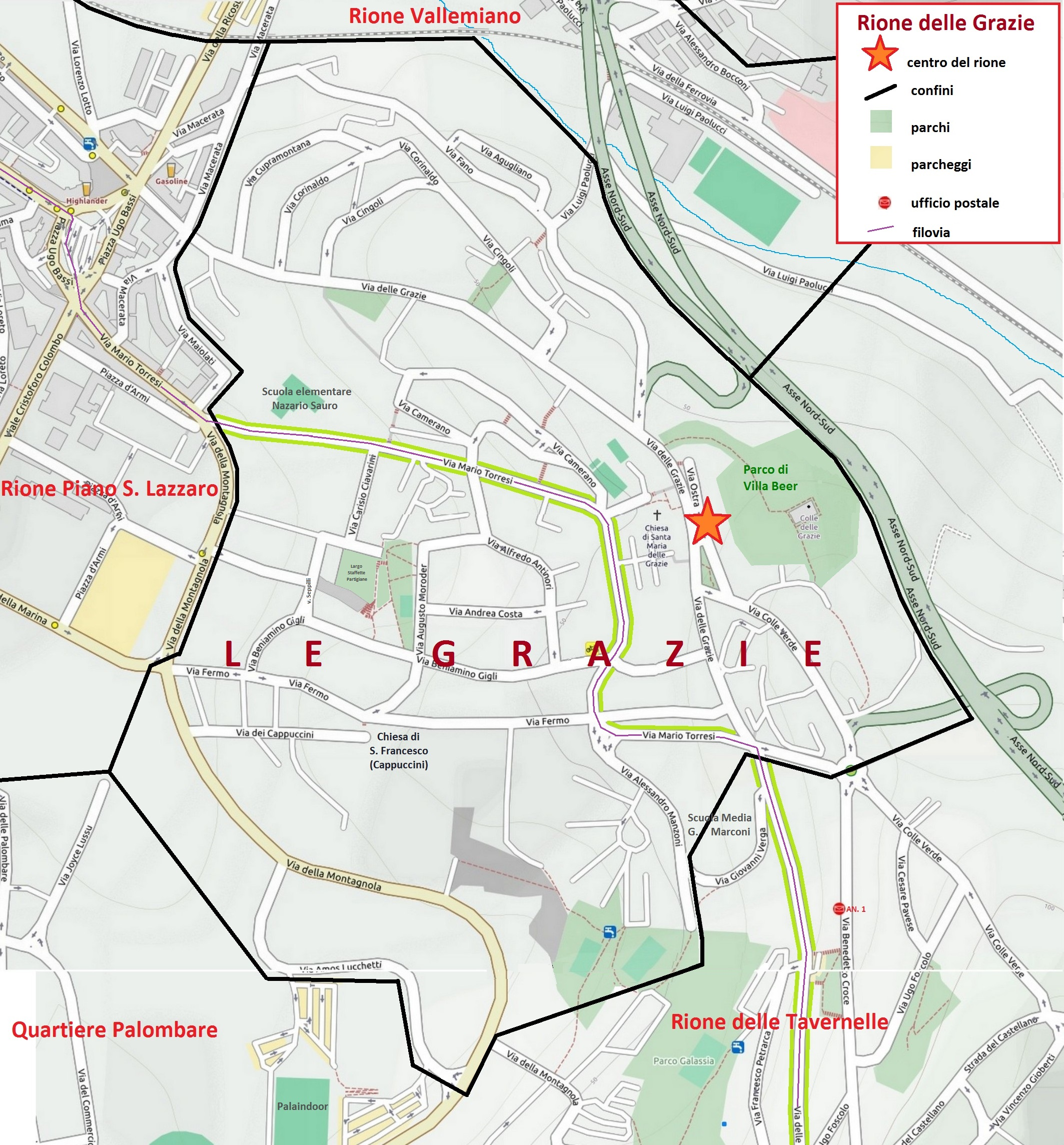 Mappa del Rione delle Grazie di Ancona, con i confini, le vie, le piazze e i parchi.